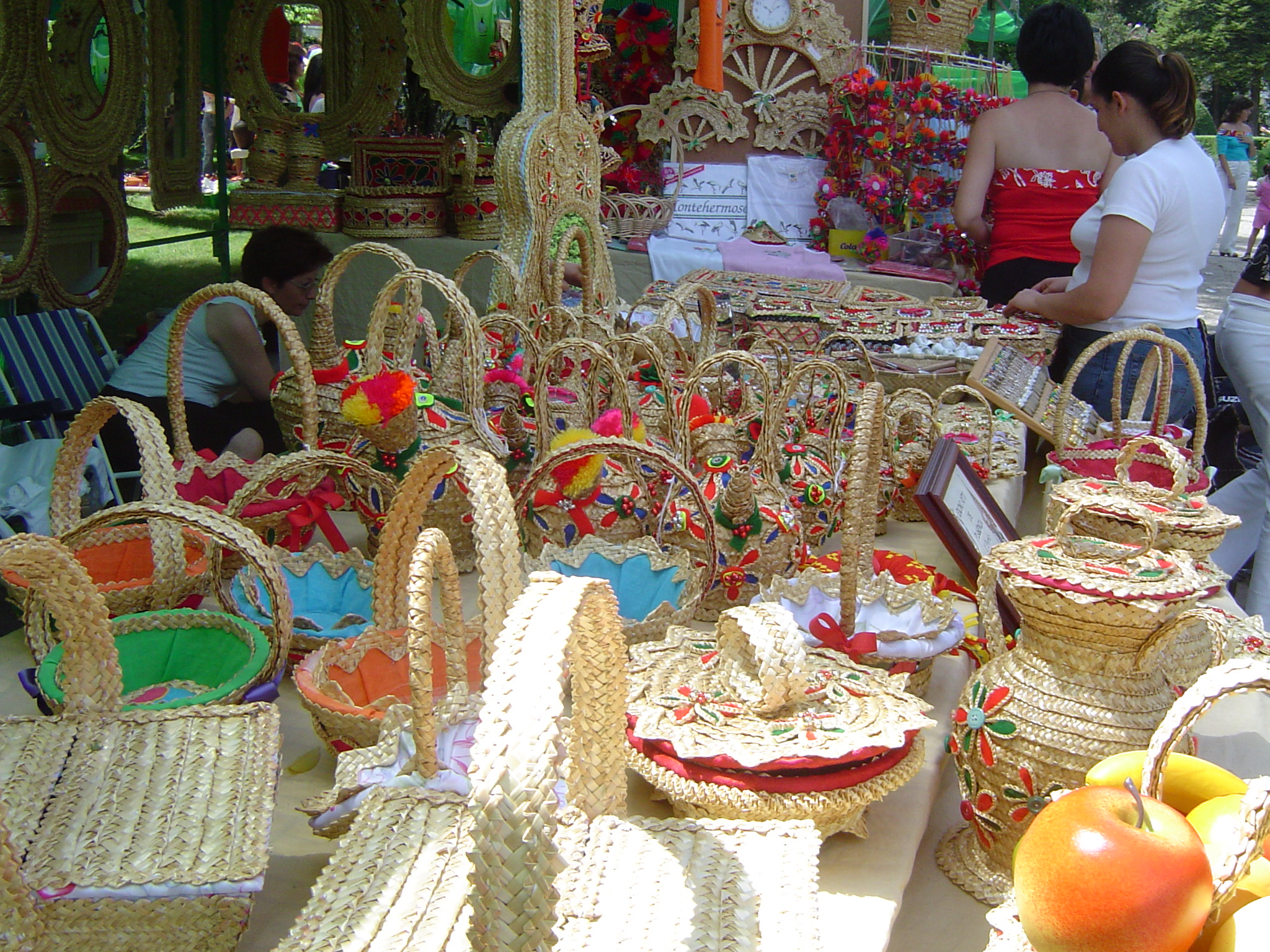 Artesanía original de Montehermoso (Cáceres).